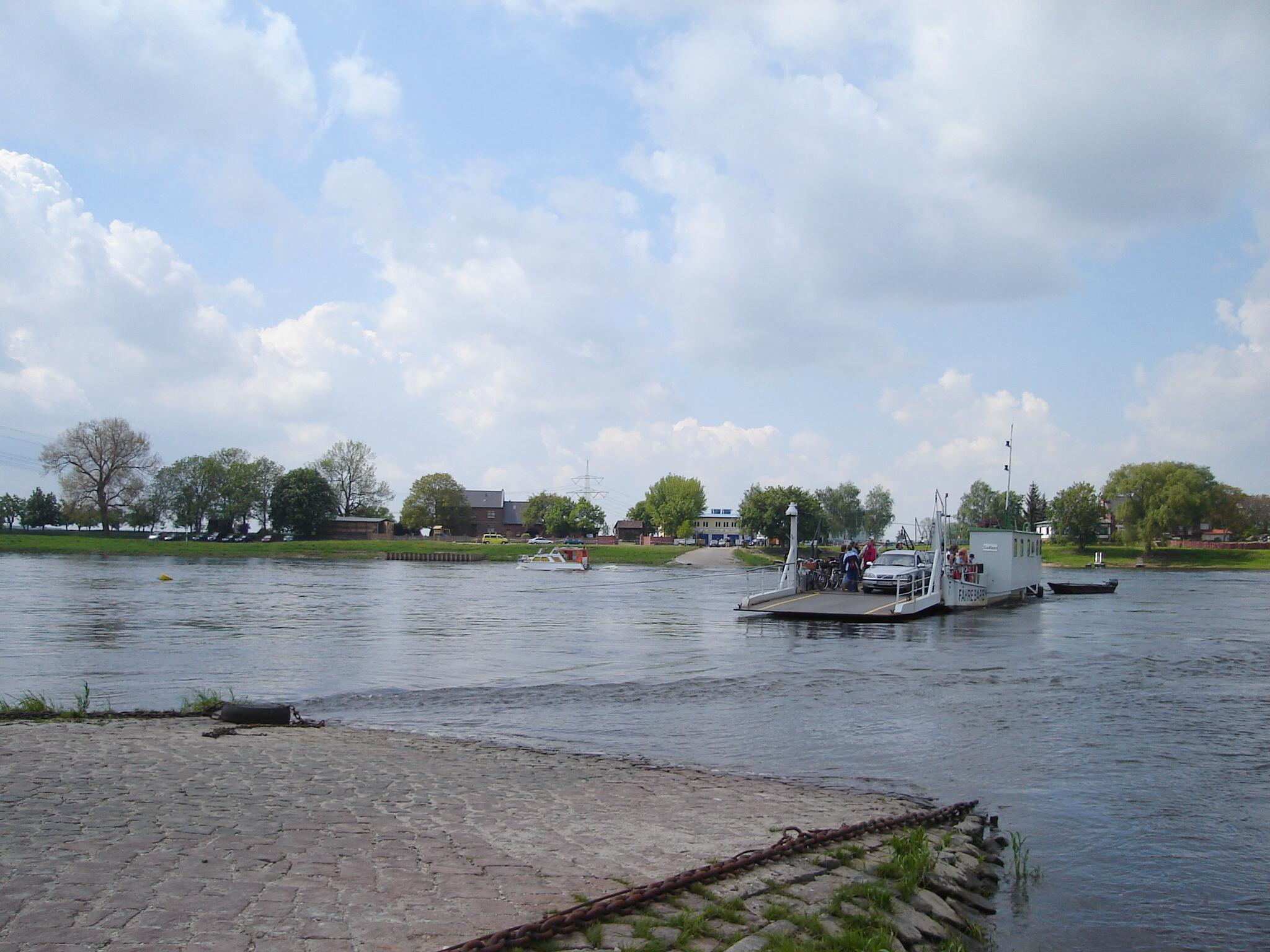 Gierseilfähre über die Elbe zwischen Barby und Walternienburg